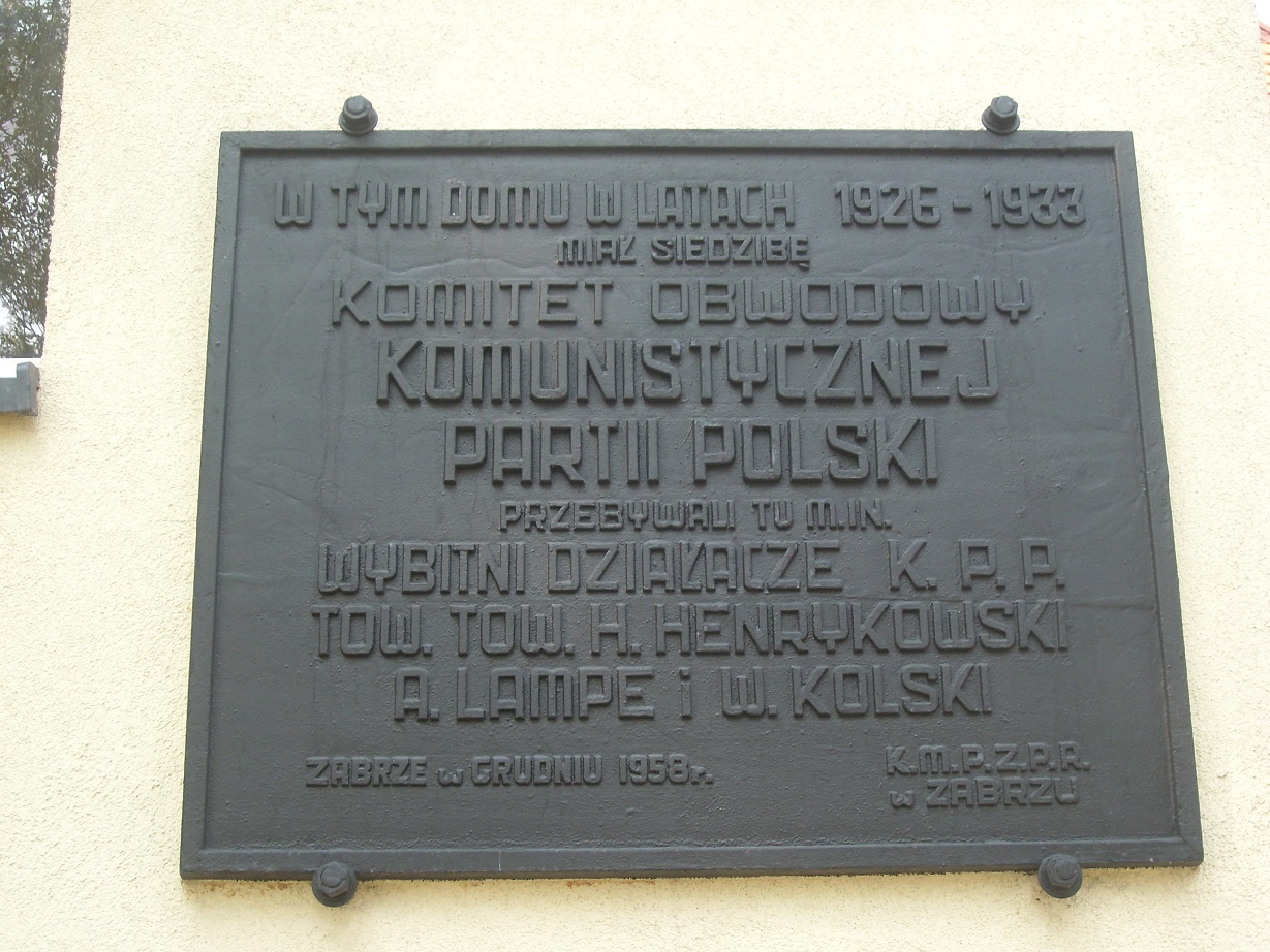 Tablica upamiętniająca znajdowanie się w budynku przy ulicy Kasprowicza Komitetu Obwodowego Komunistycznej Partii Polski